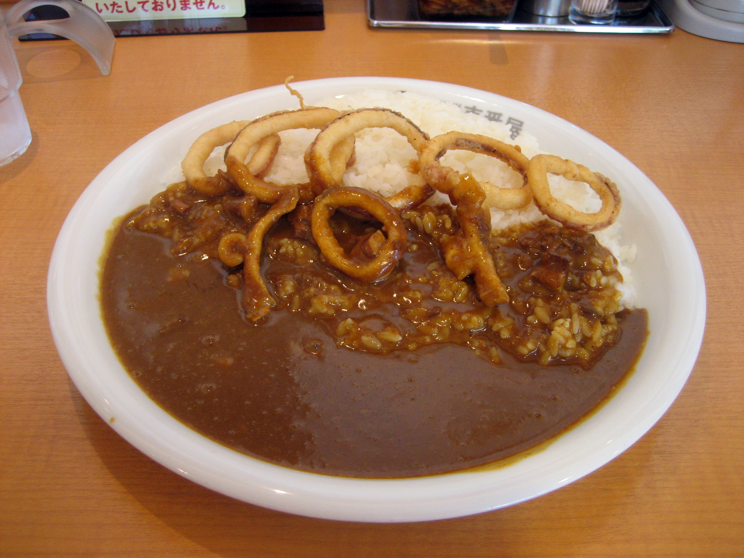 カレーハウス CoCo壱番屋のカレーライスの一つ。イカカレー。基本カロリーは887カロリー。これは、ポークカレーをベースにイカリングを上にトッピングし、そしてライスの量は400グラム、辛さのレベルは3のもの。撮影時の価格は税込みで790円。